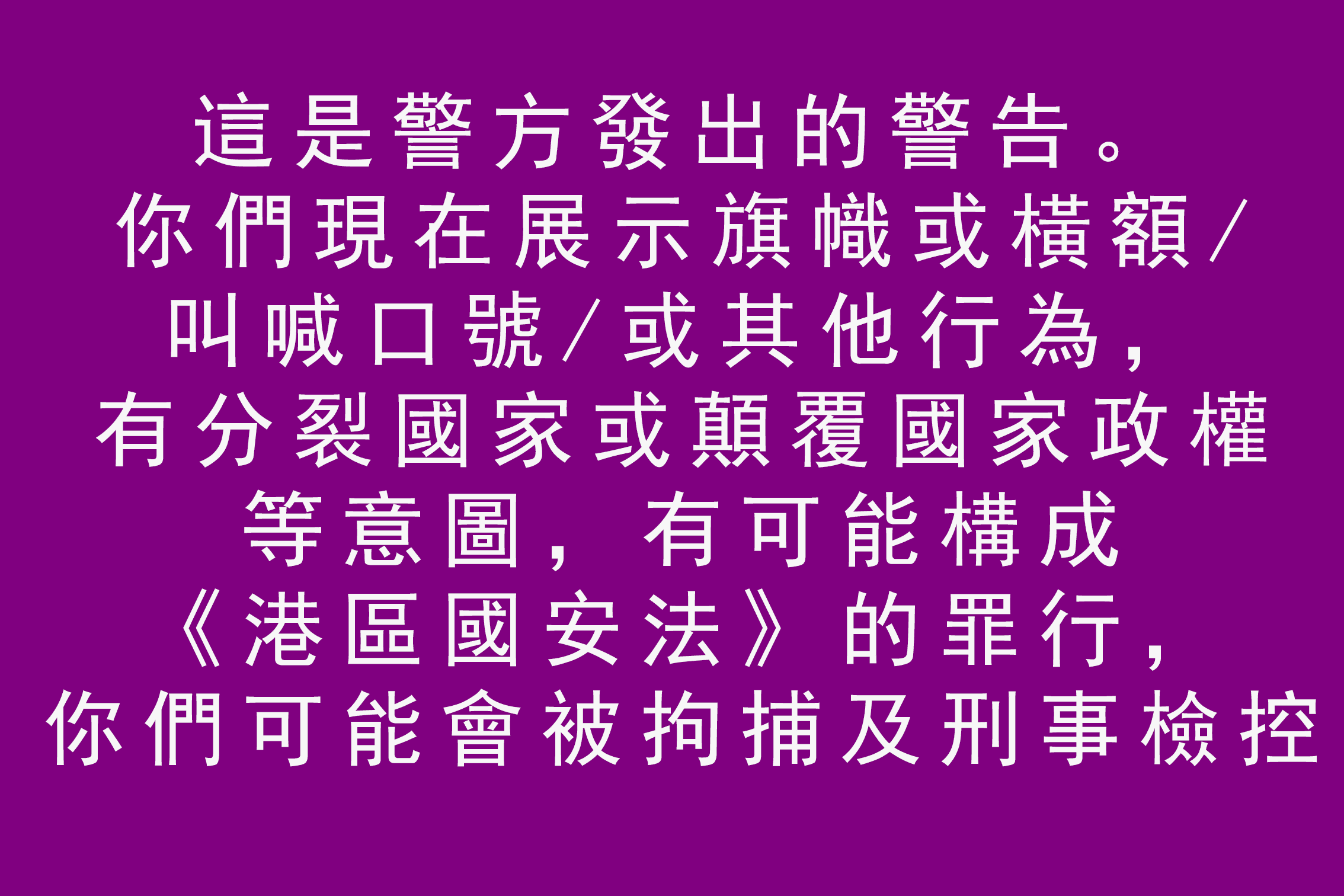 香港警方紫色警告用旗，意在提醒示威民眾有可能觸犯《港區國安法》。